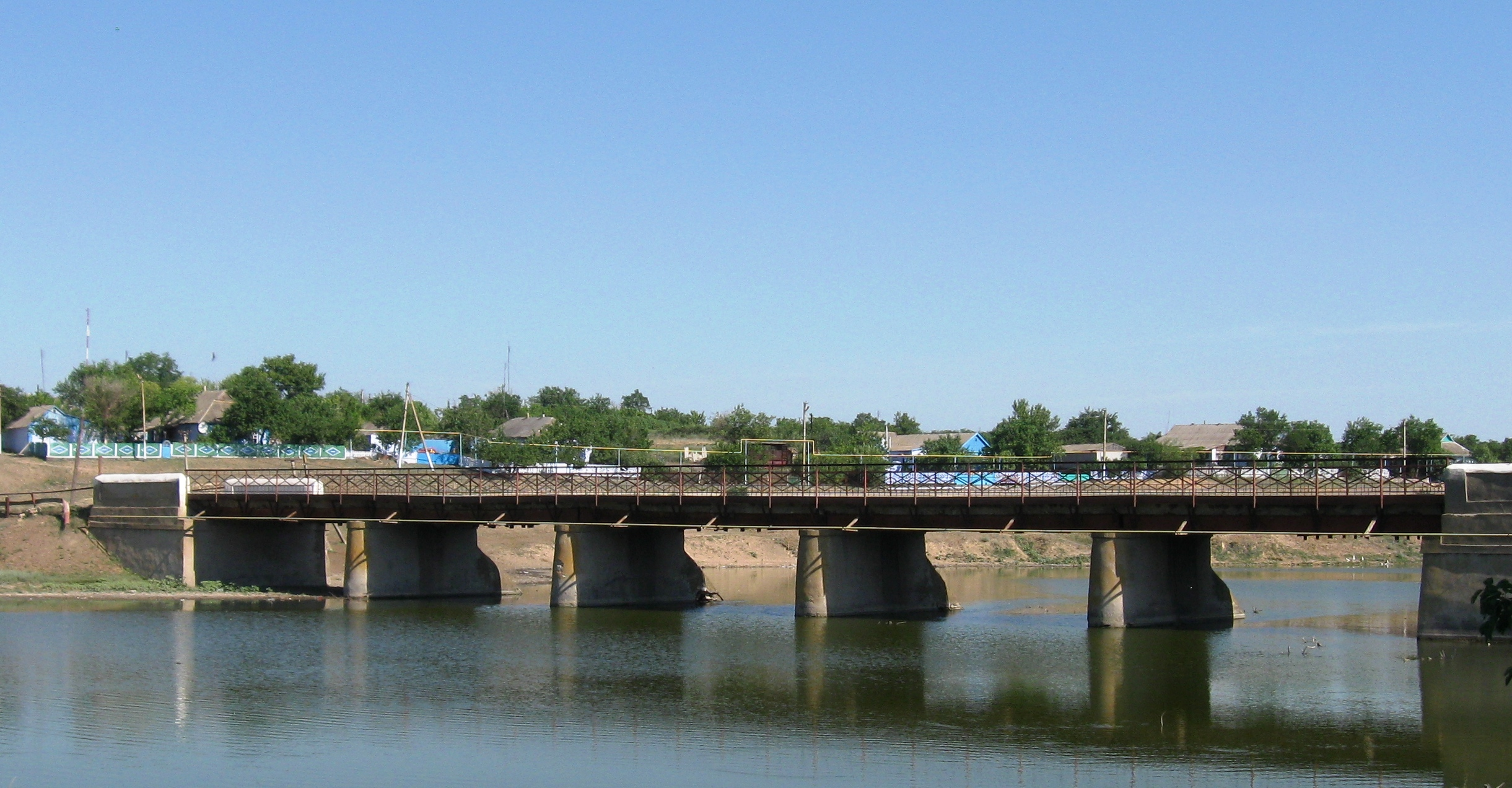 Міст у с.Володимирівка (Казанківського району), що з'єднує дві частини села